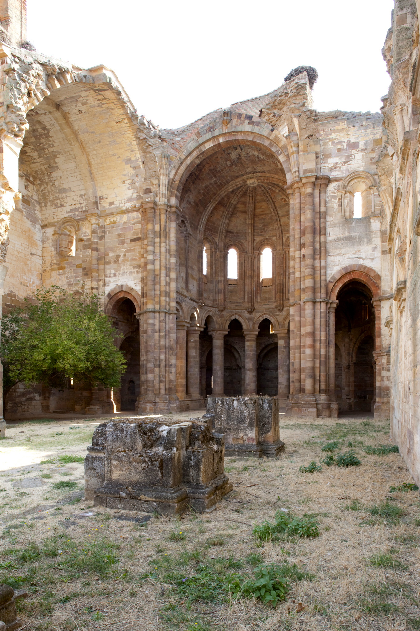 Restos del Monasterio de Moreruela, Zamora